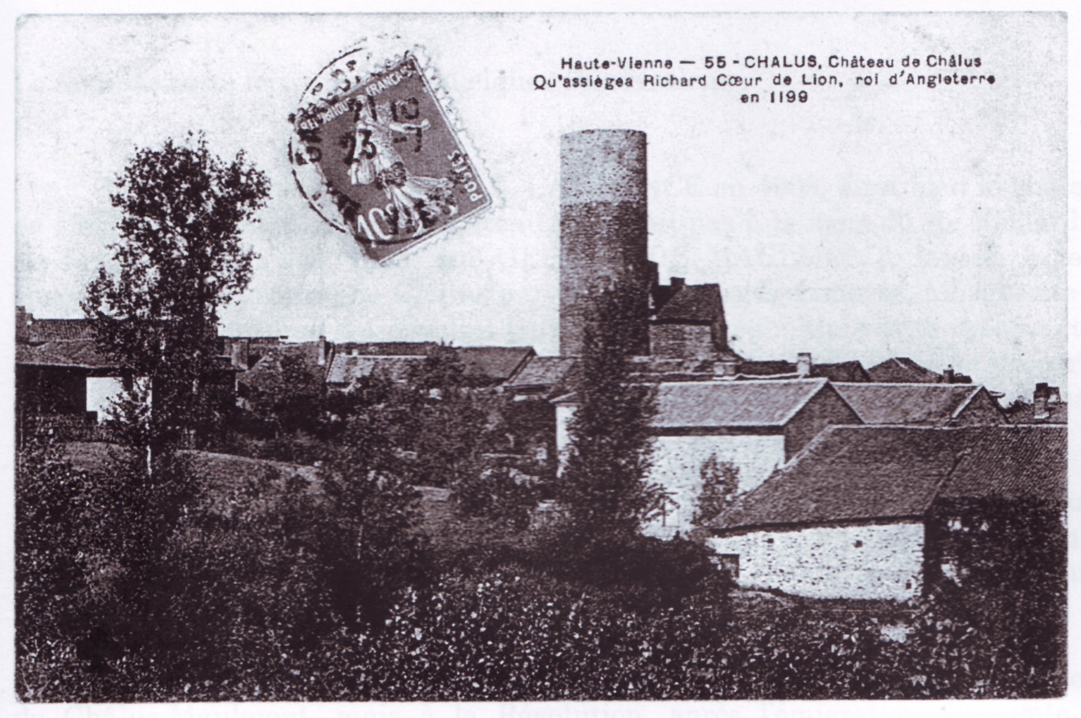 le château de Châlus Maulmont présenté sur une carte postale comme le château où fut mortellement blessé Richard Coeur de Lion